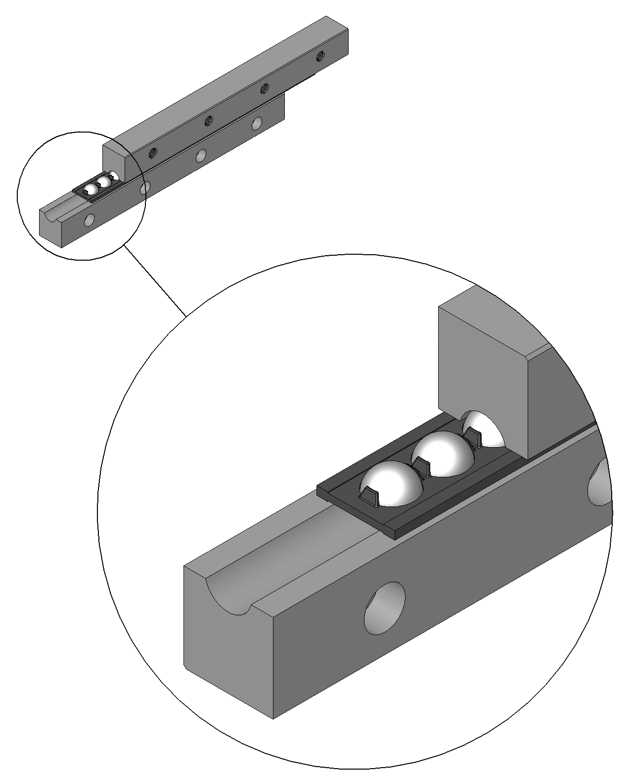 Darstellung einer Linearfuehrung nach DIN 644 mit vergroessertem Detail. Die DIN 644 legt die Einbau- und Anschlussmasse fuer die Fuehrungen fest. Der innere Aufbau bleibt dem Hersteller ueberlassen. Die hier gezeigte Fuehrung besitzt Kugeln als Waelzkoerper. Die Kugeln haben Zweipunktkontakt.